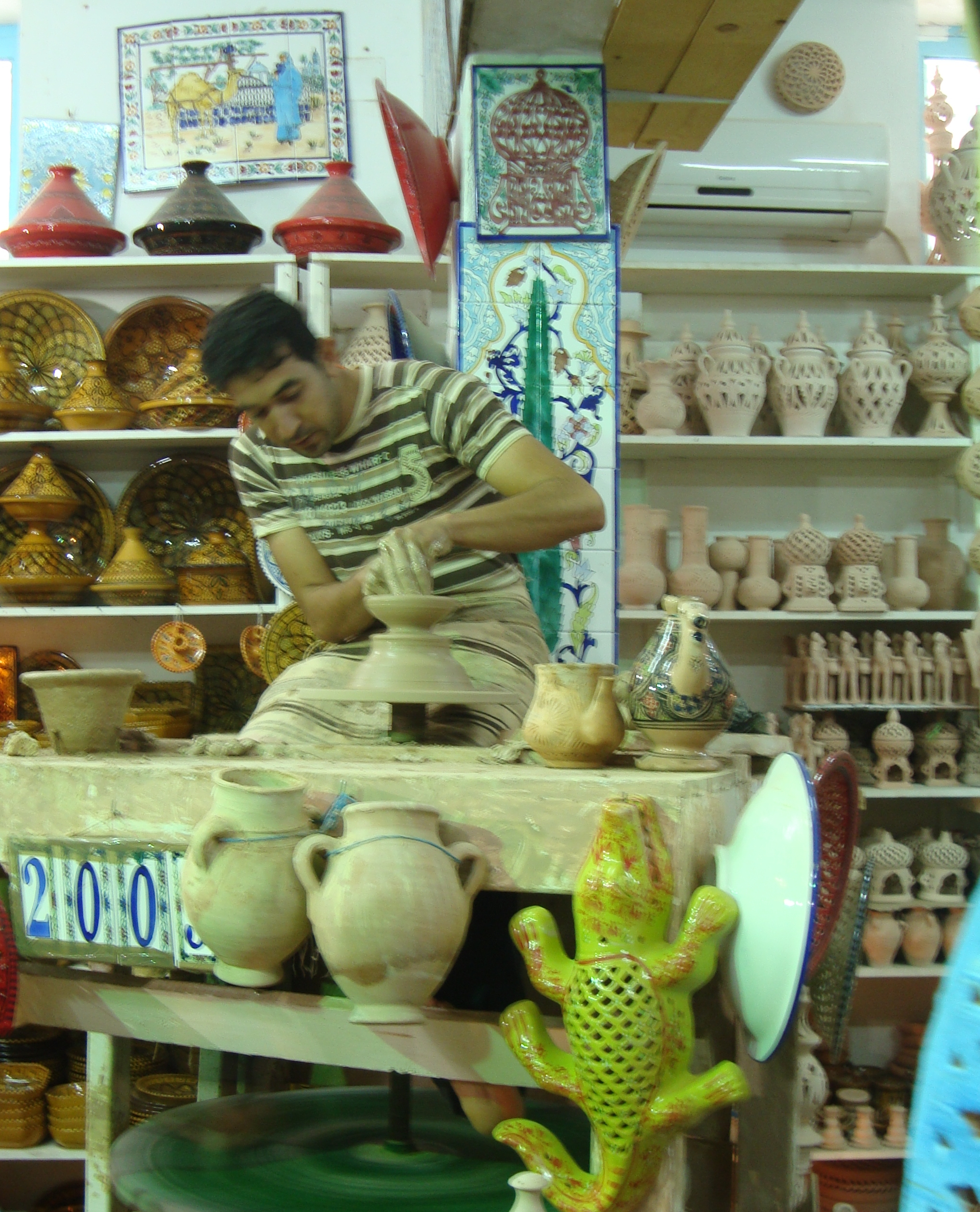 Potier de Djerba utilisant un tour à Guellala en novembre 2009.